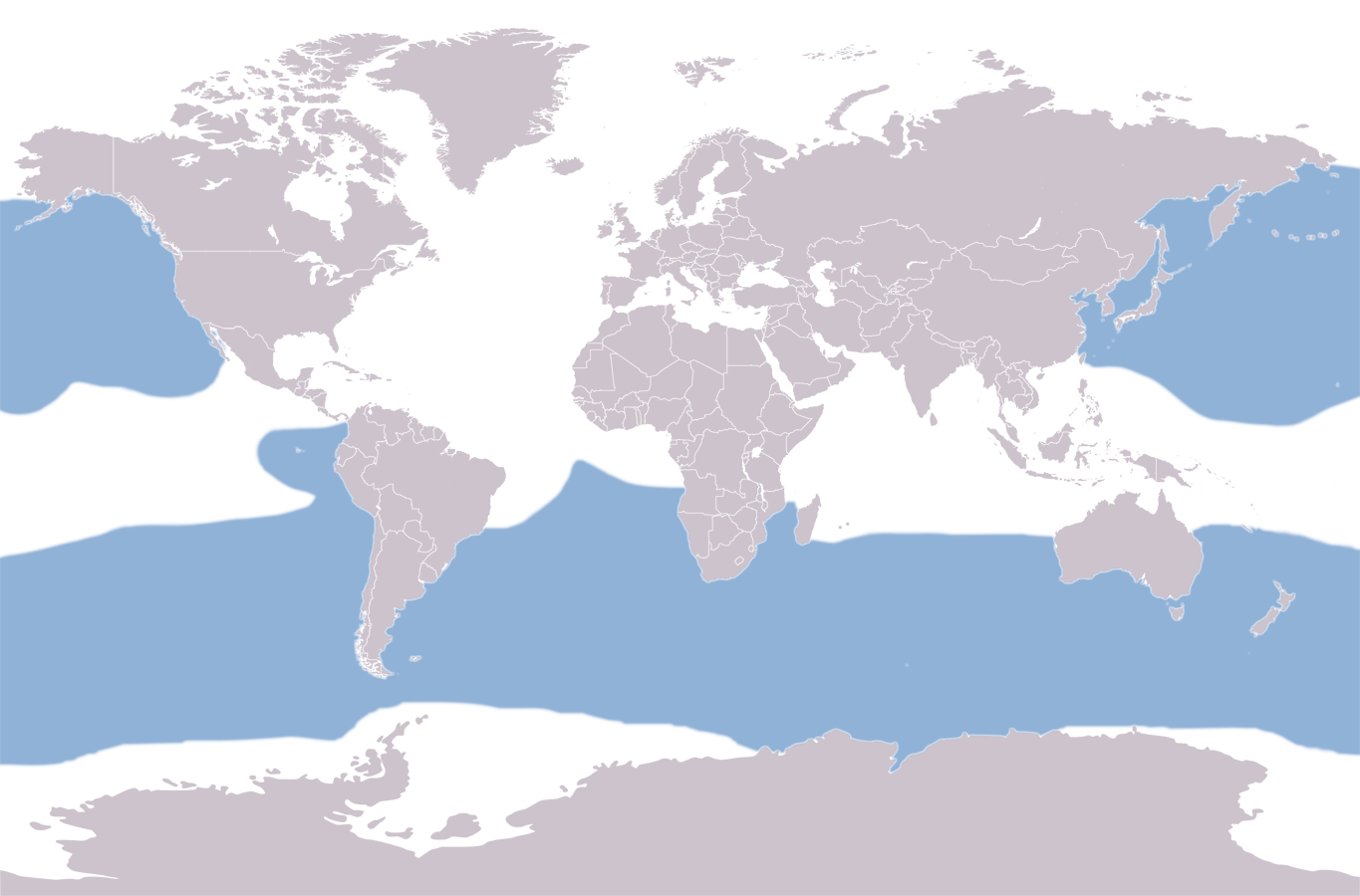 Diomedeidae range map